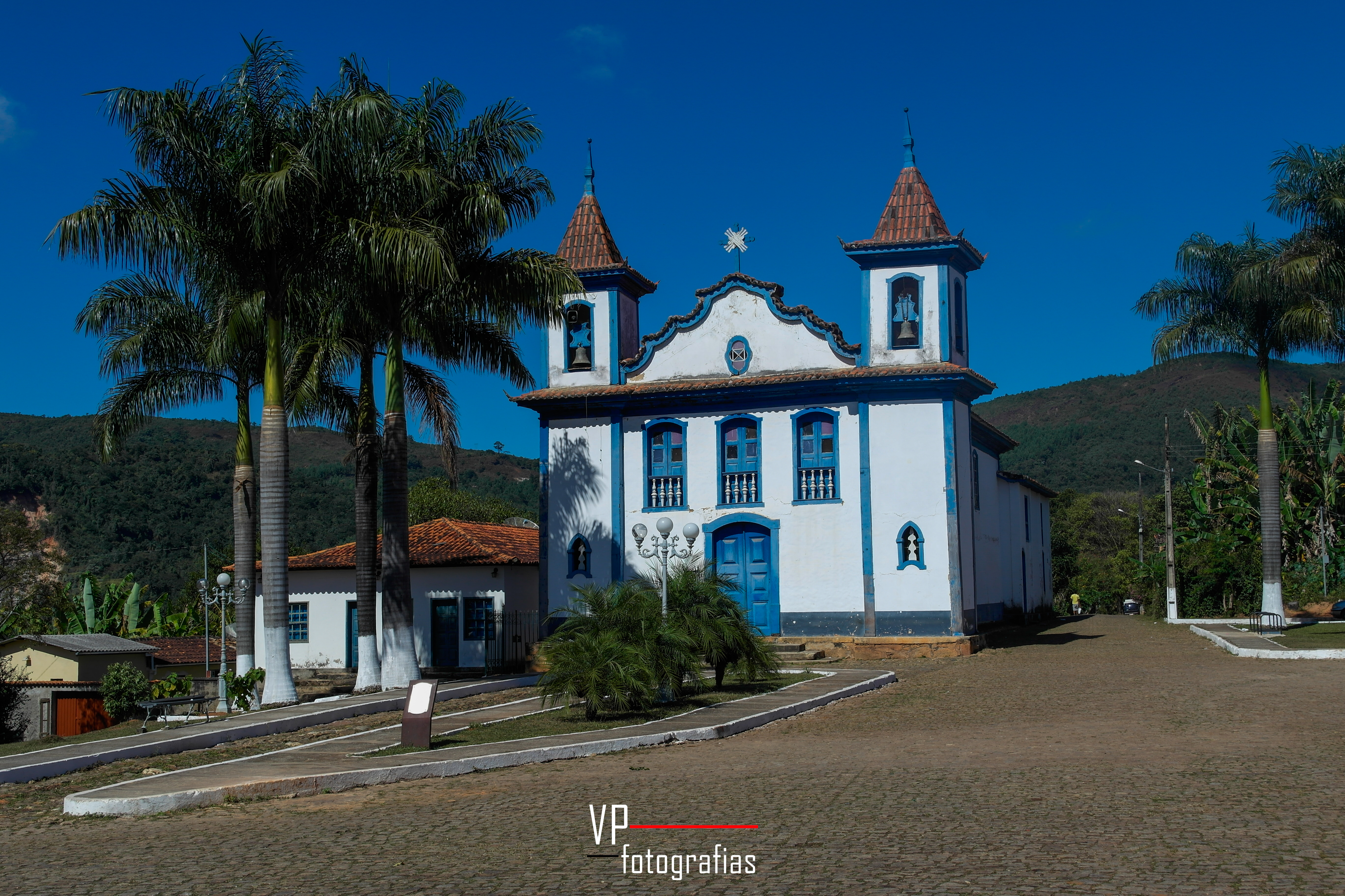 Barão de Cocais - State of Minas Gerais, Brazil